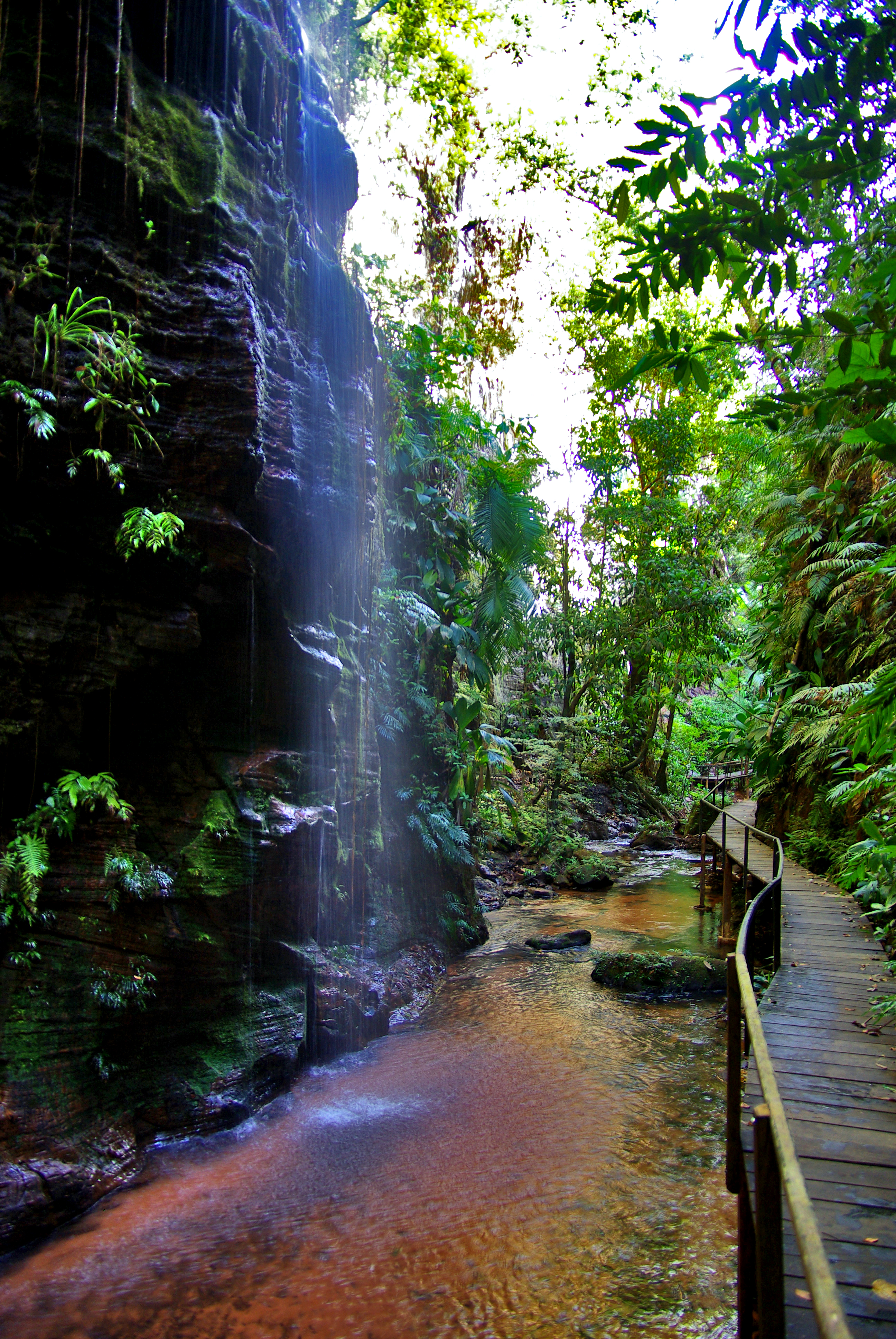 Cachoeira da Pedra Caída, Carolina, Maranhão, Brasil.